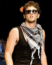 Christopher Uckermann durante um show em 2008.